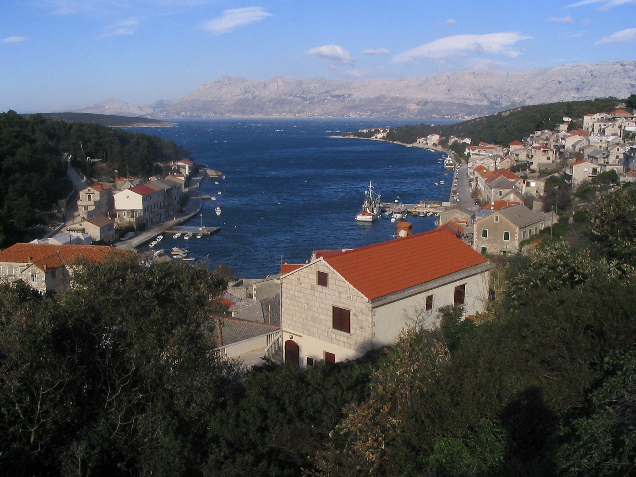 Povlja, Brač, Croatia